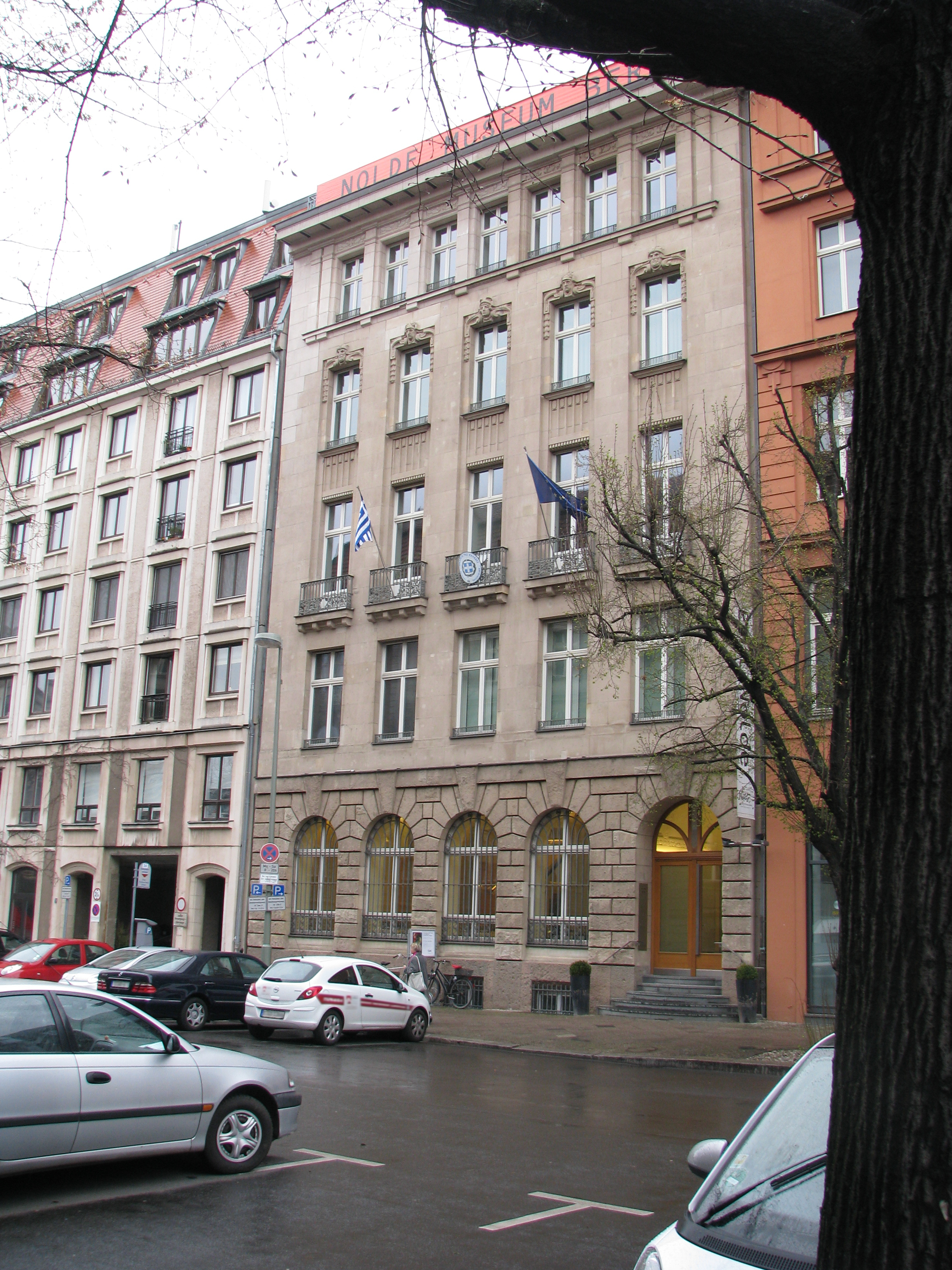 Gebäude an der Jägerstraße in Berlin-Mitte (Hausnummern 54 bis 56 v. r. n. l.) mit dem Hinweisschild zur ehemaligen Berliner Dependance der Nolde Stiftung Seebüll. Die Museumsräume befanden sich im ersten Obergeschoss.